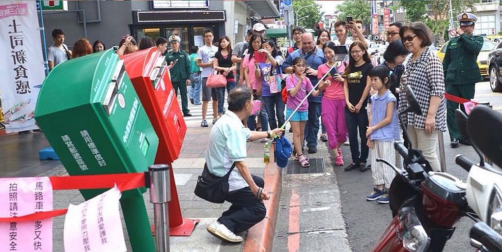 台北市中山區歪腰郵筒